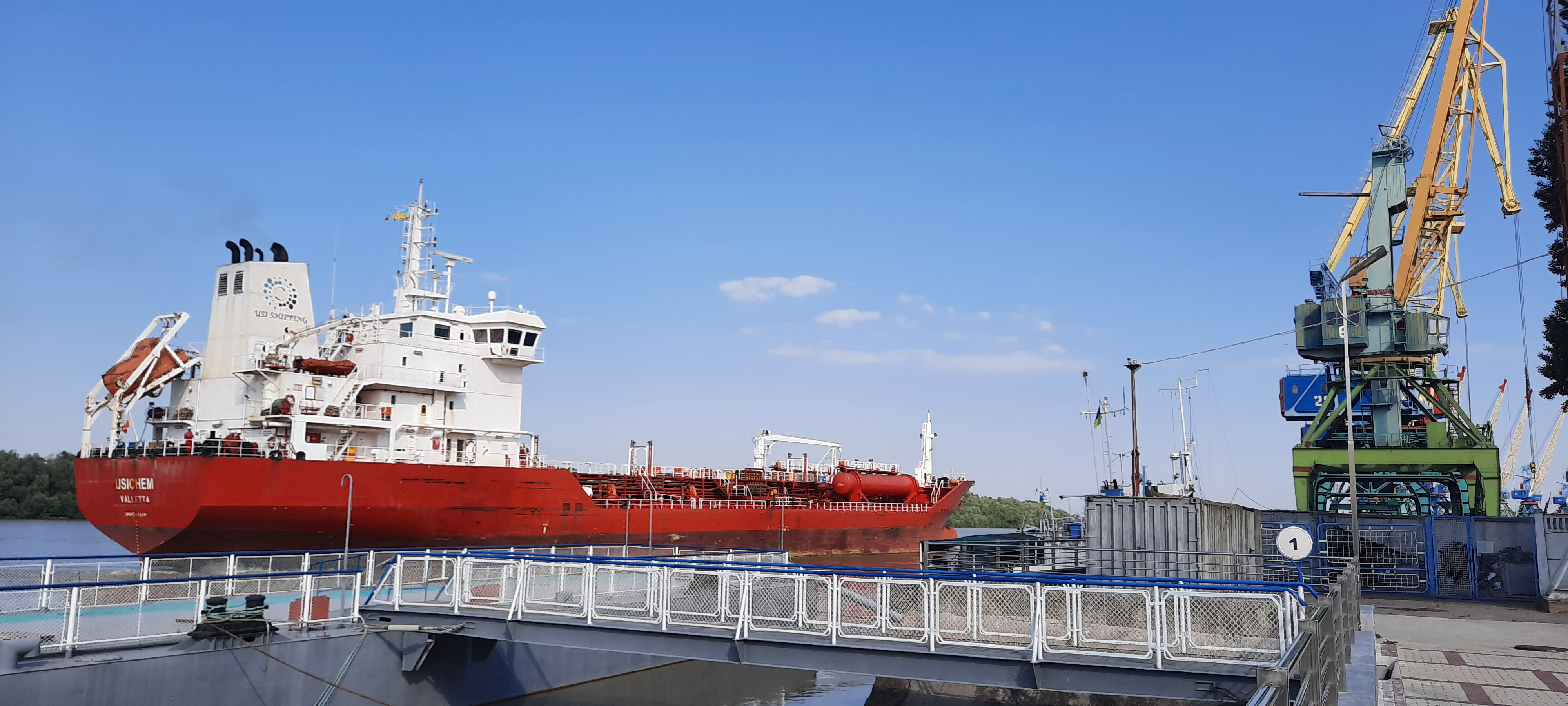 Заход танкера Usichem в Измаильский морской торговый порт